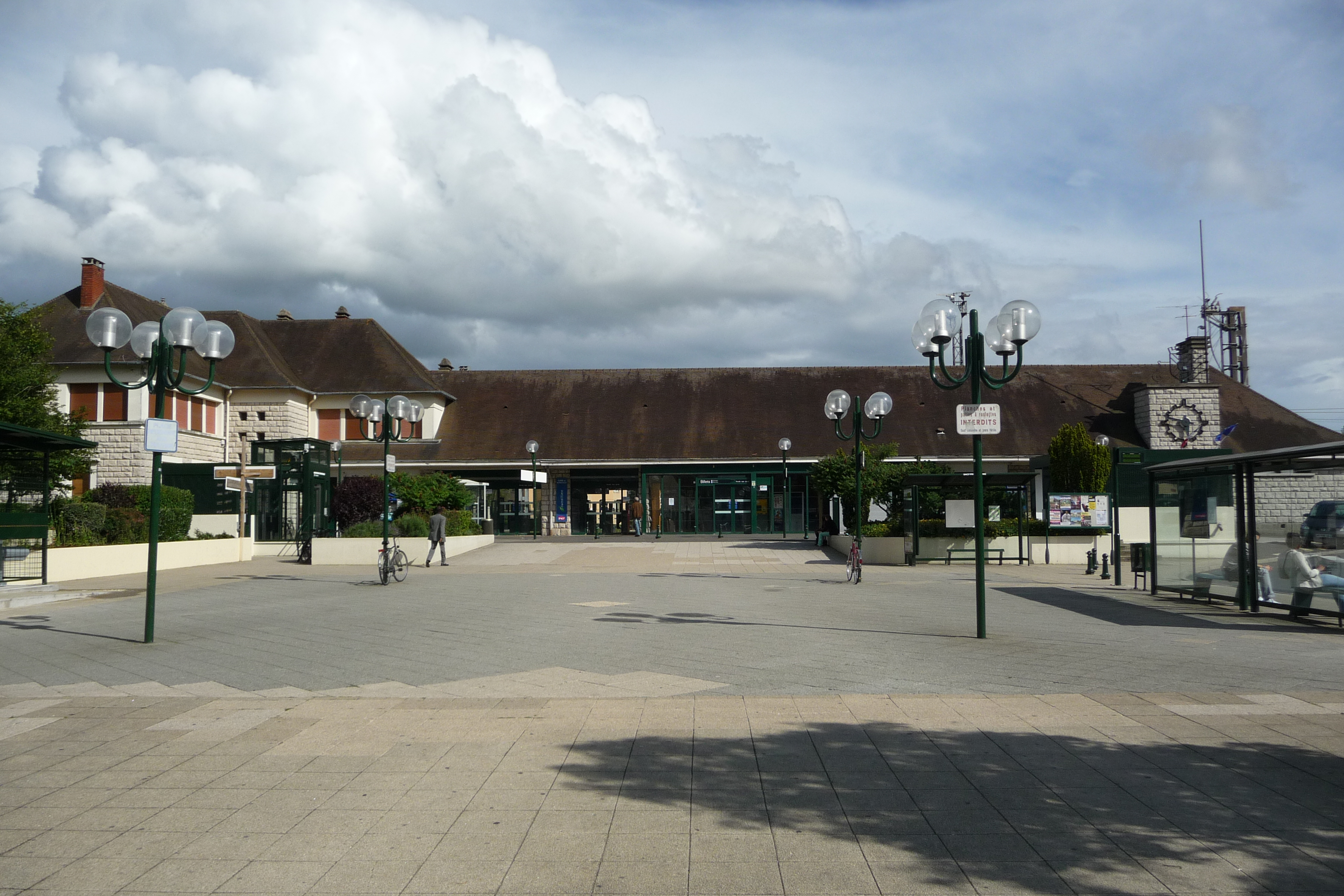 Vue de la gare et de la place de la gare de Rambouillet.